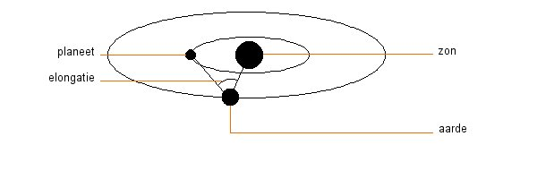 Afbeelding waarin grafisch de betekenis van het begrip elongatie te zien is voor een planeet die dichter bij de zon staat dan de aarde. Deze afbeelding heb ik zelf getekend.